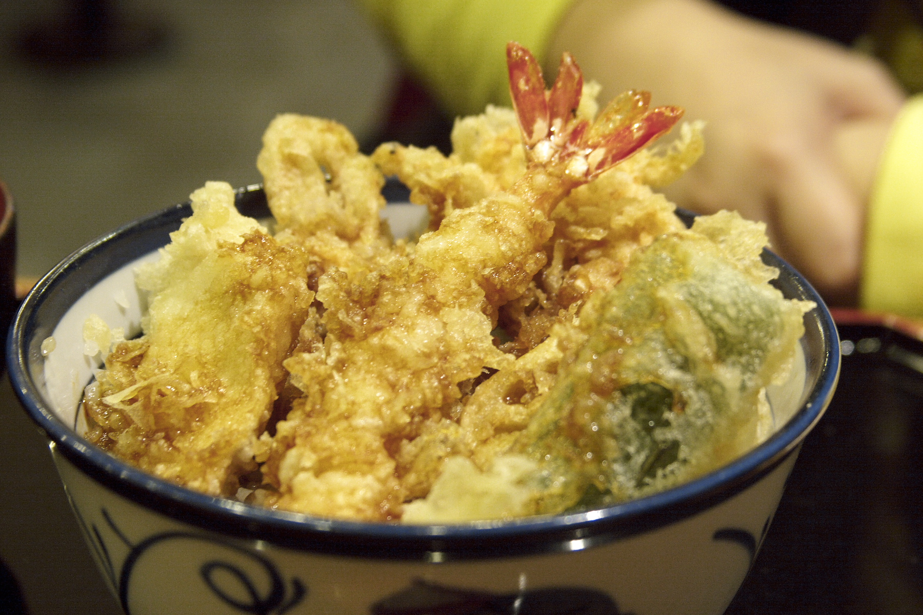 東京の料理店にある天丼。